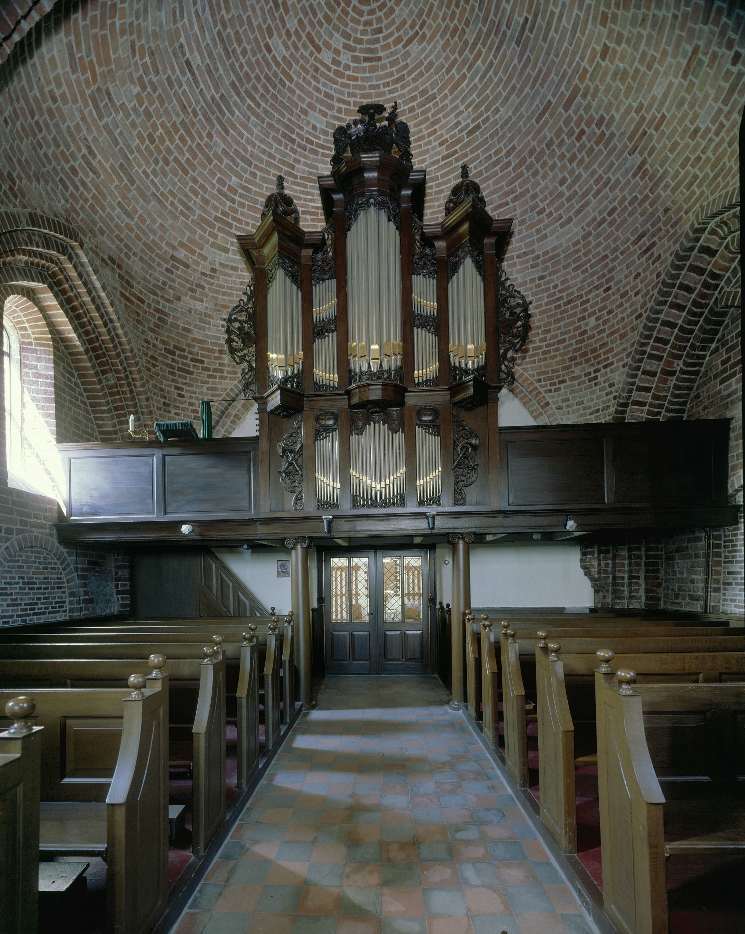 Nederlands Hervormde Kerk: Interieur, aanzicht orgel, orgelnummer 1499 (opmerking: Gefotografeerd voor Het Historische Orgel in Nederland 1790-1818)